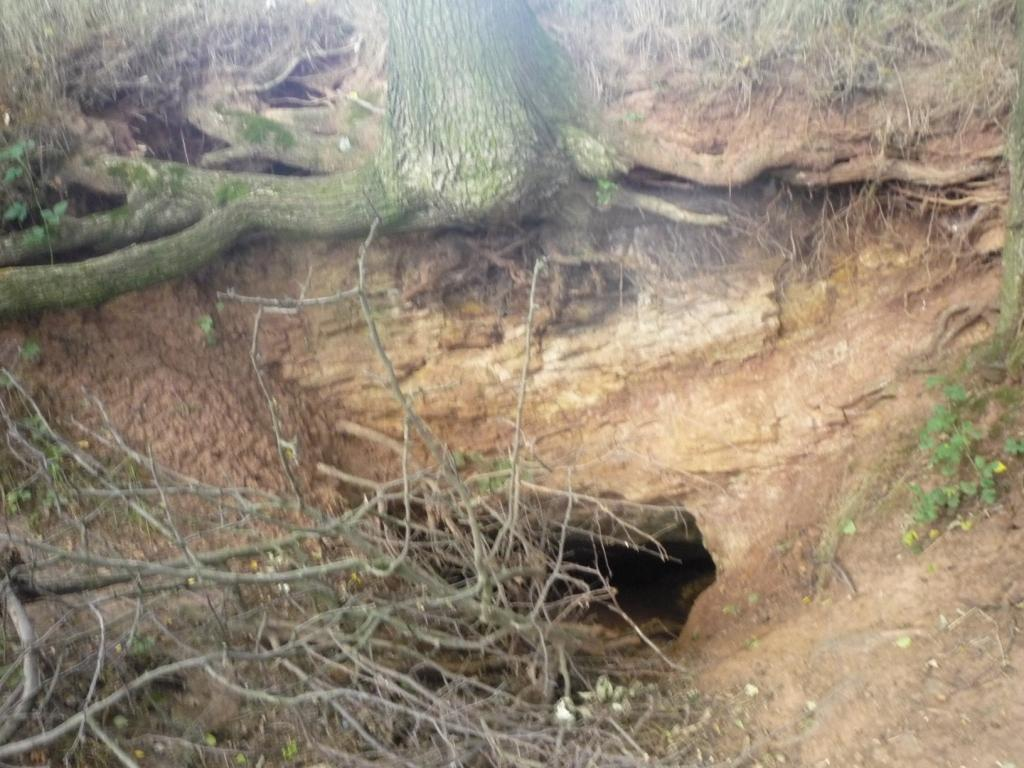 Wejście do jaskini Oaza w Płóczkach Dolnych